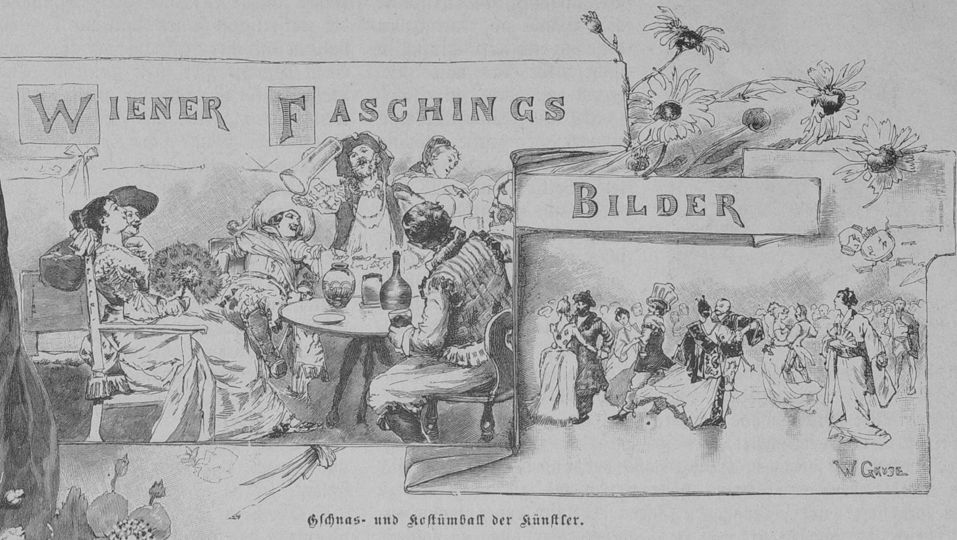 Wiener Faschings-Bilder, Gschnas- und Kostümball der Künstler